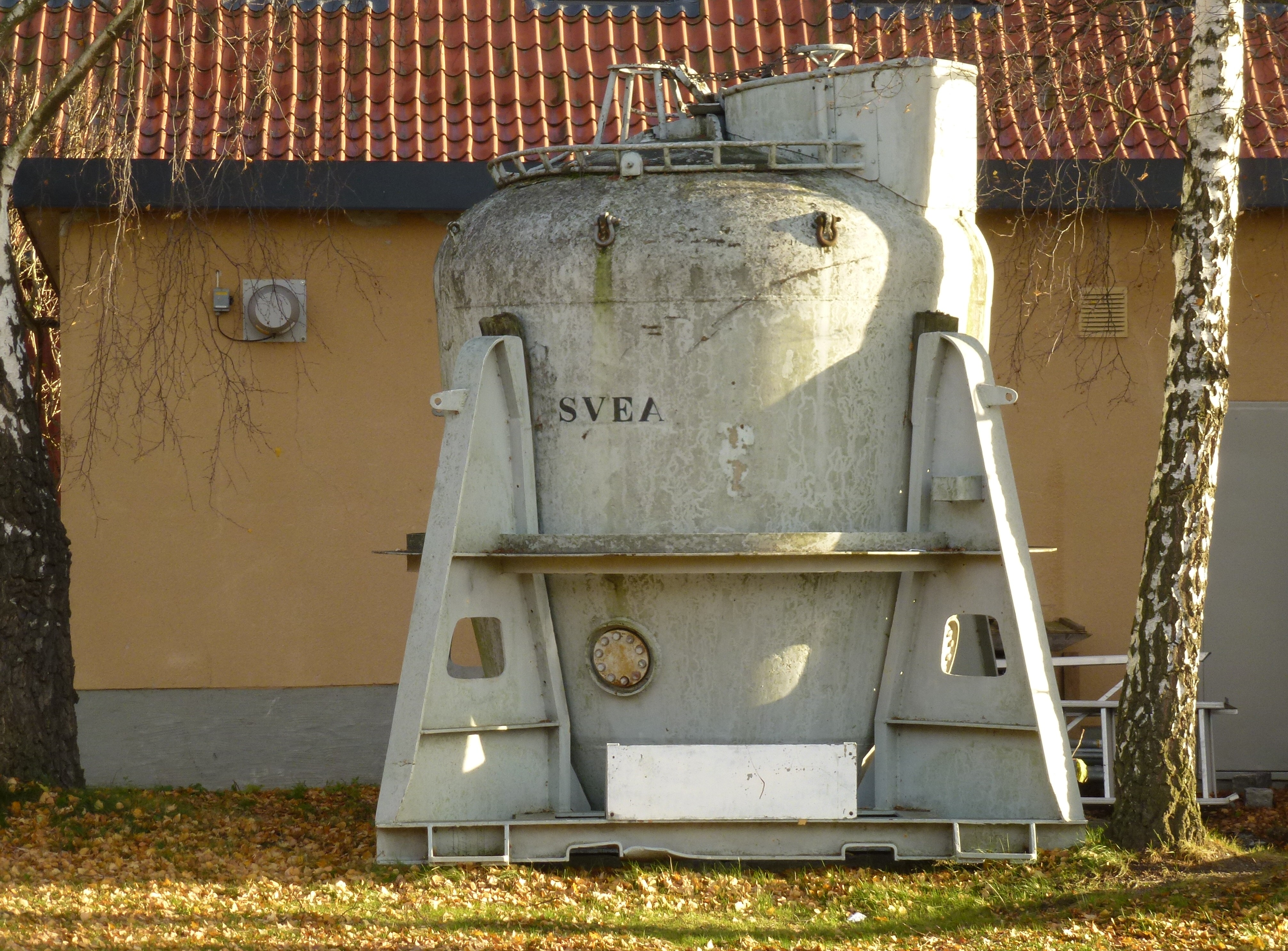 Dyktankhuset på Djurgården, ubåtsräddningsklockan ”SVEA”